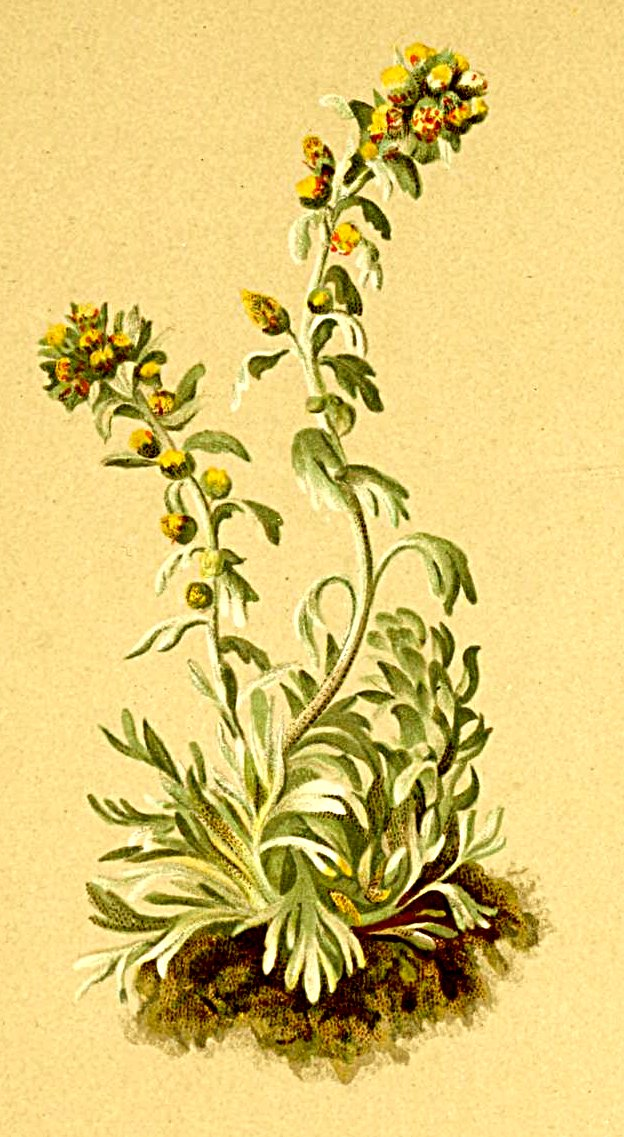 Artemisia spicata (Artemisia genipi)